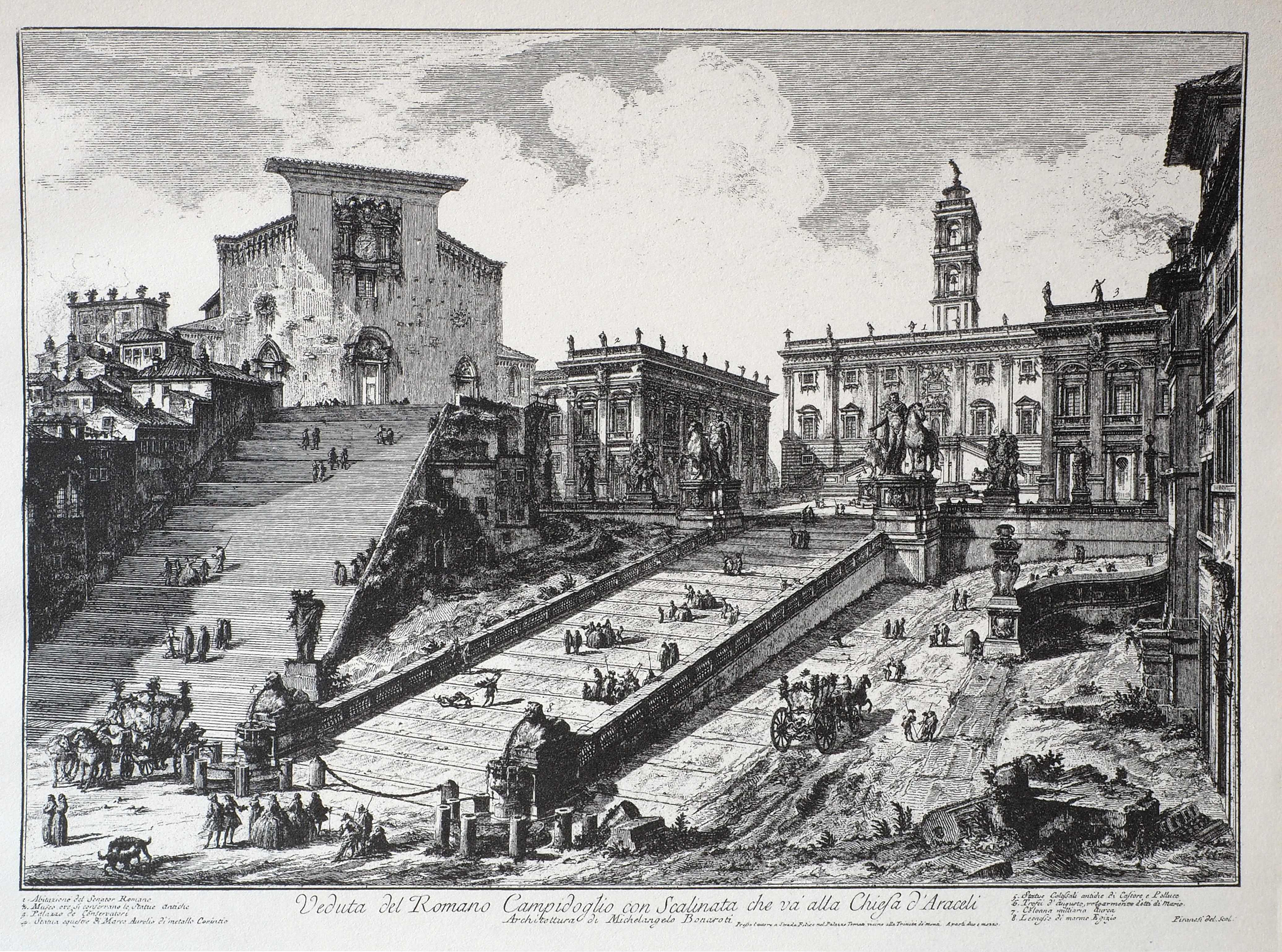 Giovanni Battista Piranesi; 1751; Stich; Aracoeli und Kapitol (Rom)